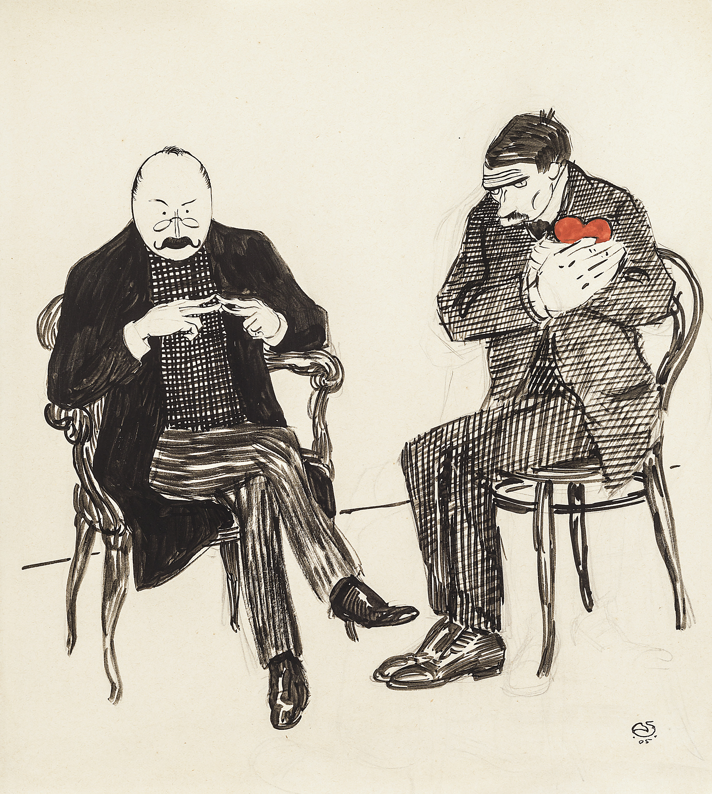 Alexander von Salzmann: Herzschmerz. Aquarell und Tusche über Bleistift auf Karton, 27 x 24,5 cm, rechts unten monogrammiert und datiert